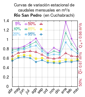 Curva de Variación Estacional del río San Pedro (del Salar de Atacama) en Cuchabrachi. # cita publicación # | apellido = Dirección General de Aguas # | nombre = # | enlace-autor = Ministerio de Obras Públicas (Chile) # | título = Diagnóstico y clasificación de los cursos y cuerpos de agua según objetivos de calidad. Cuenca Río San Pedro # | ubicación = Santiago de Chile # | editorial = Ministerio de Obras Públicas (Chile) # | año = 2004 # | edición = # | url = # | urlarchivo = # | fechaarchivo = # | ref = harv # Tabla 4.1 (m3/s) pág. 27 mes 5% 10% 20% 50% 85% 95% abr 0.822 0.773 0.723 0.646 0.578 0.547 may 0.822 0.799 0.771 0.718 0.653 0.615 jun 0.856 0.828 0.795 0.735 0.668 0.632 jul 0.938 0.893 0.842 0.753 0.655 0.604 ago 1.025 0.952 0.870 0.733 0.593 0.524 sep 0.822 0.788 0.749 0.680 0.604 0.563 oct 0.711 0.689 0.662 0.611 0.548 0.511 nov 0.828 0.757 0.687 0.594 0.527 0.502 dic 0.752 0.718 0.680 0.612 0.538 0.498 ene 1.380 1.147 0.943 0.708 0.571 0.531 feb 1.019 0.900 0.789 0.649 0.555 0.523 mar 0.793 0.750 0.705 0.637 0.577 0.550 This plot was created with Gnuplot.